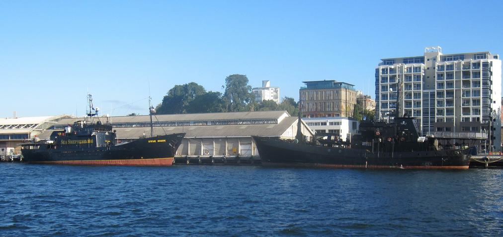 MV Steve Irwin - MV Bob Barker (Hobart).